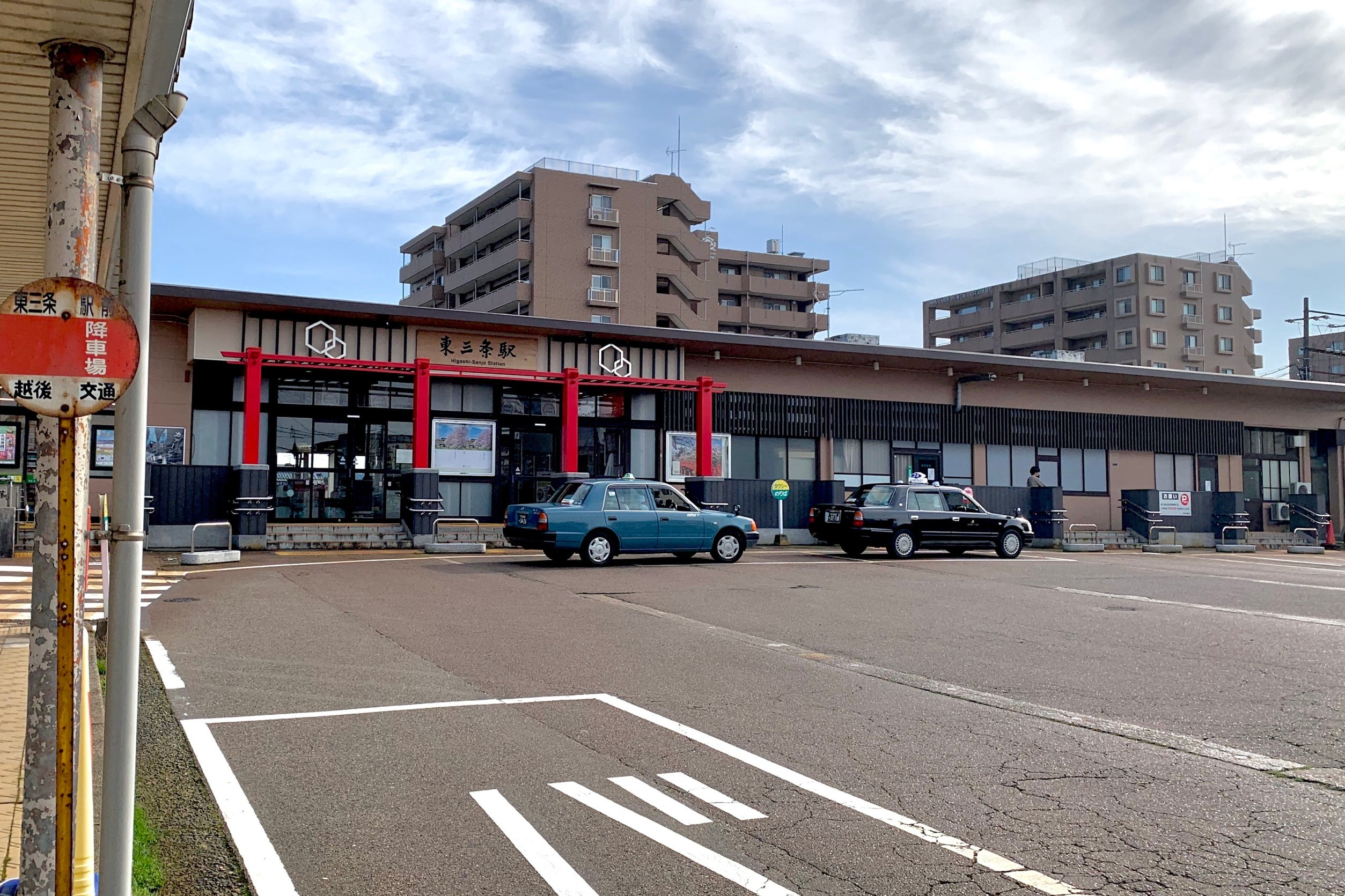 東三条駅 北口駅舎（2020年3月）